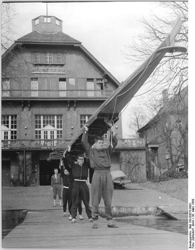 Berlin, TSC Oberschöneweide, Ruderregatta Zentralbild E. Zühlsdorf 30.3.1959 Berlin: Wassersportler bereiten sich auf die kommende Saison vor Zahlreiche Wassersportler Berlins nutzten das schöne Osterwetter aus, um ihre Boote für die kommende Saison fertigzumachen. UBz: Mitglieder des TSC Oberschöneweide, Sektion Rudern, tragen in Friedrichshagen ein Rennboot aus dem Bootshaus.